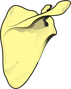 Escápula u omóplato. Vista posterior. Basado a partir de: Latarjet M, Ruiz Liard A. Anatomía Humana. 5a ed: Panamericana; 1999. 1007 p.